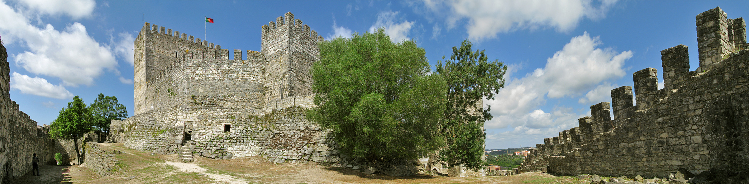 Torre de menagem do Catelo de Leiria